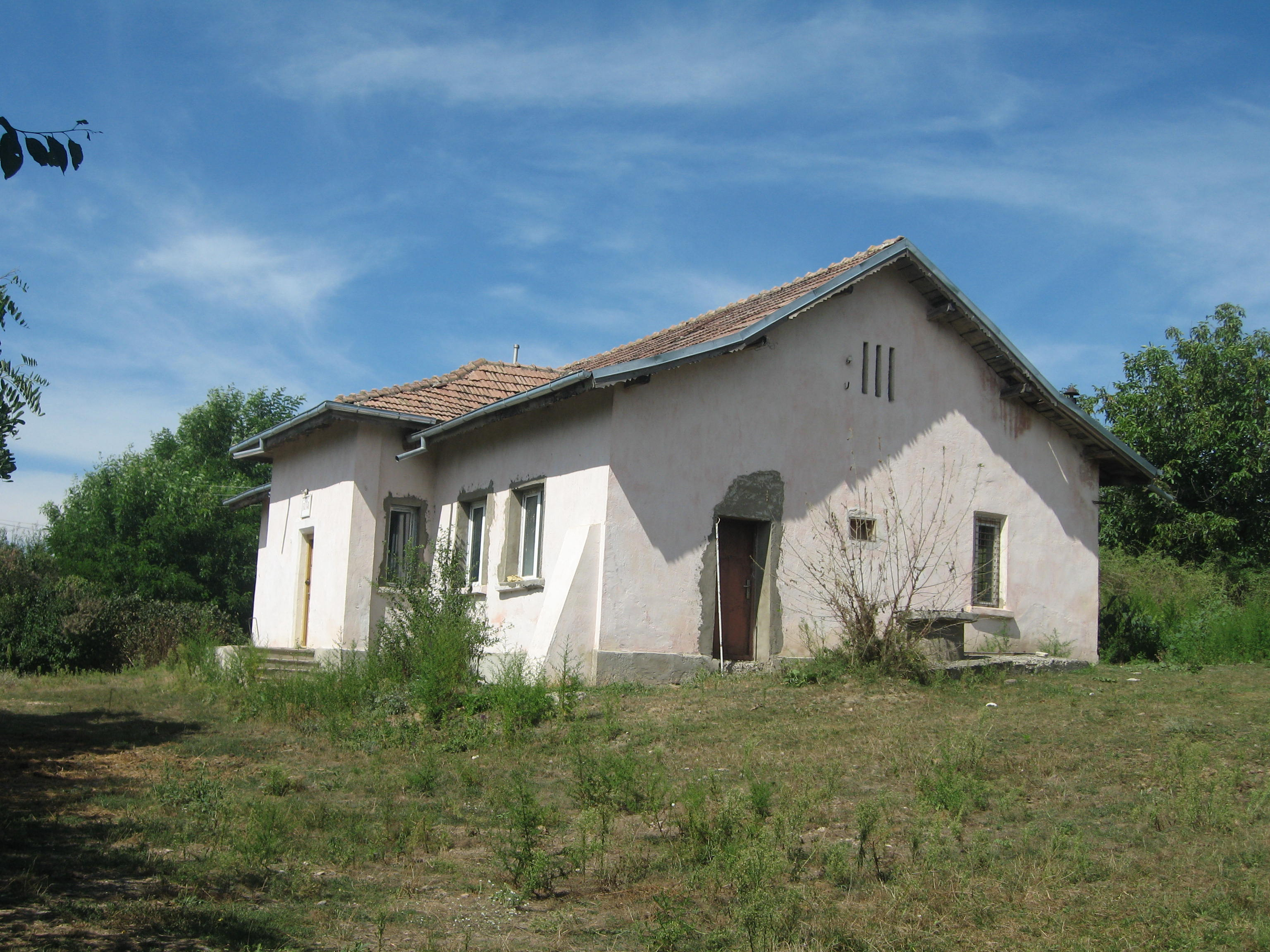 Conacul din Dângeni, Botoșani County, Romania